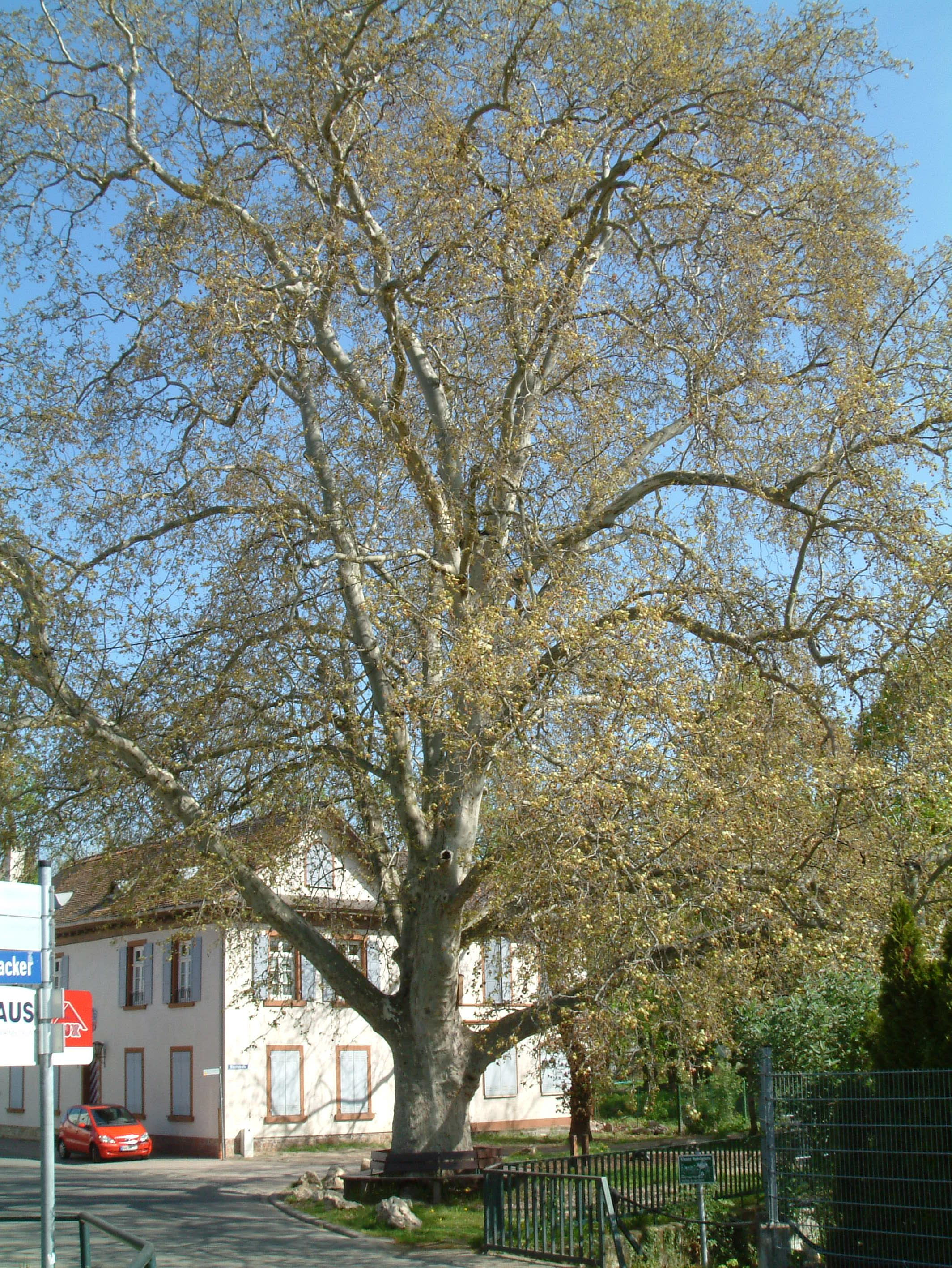 Naturdenkmal "Dicker Baum" zu Dirmstein, selbst fotografiert am 28.04.2006 und freigegeben durch Benutzer:Mundartpoet